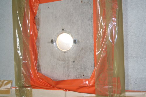 L'objectif de la camera obscura du Lherm Photo Jean-Daniel Dodin, avec l'autorisation du musée